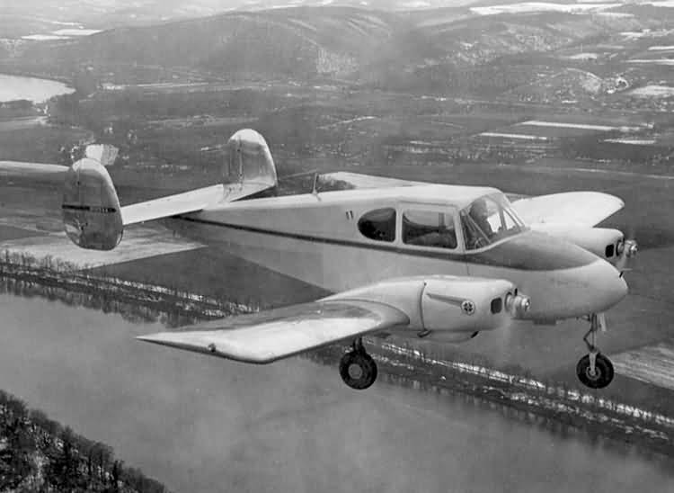 Piper apache con el tren sacado.